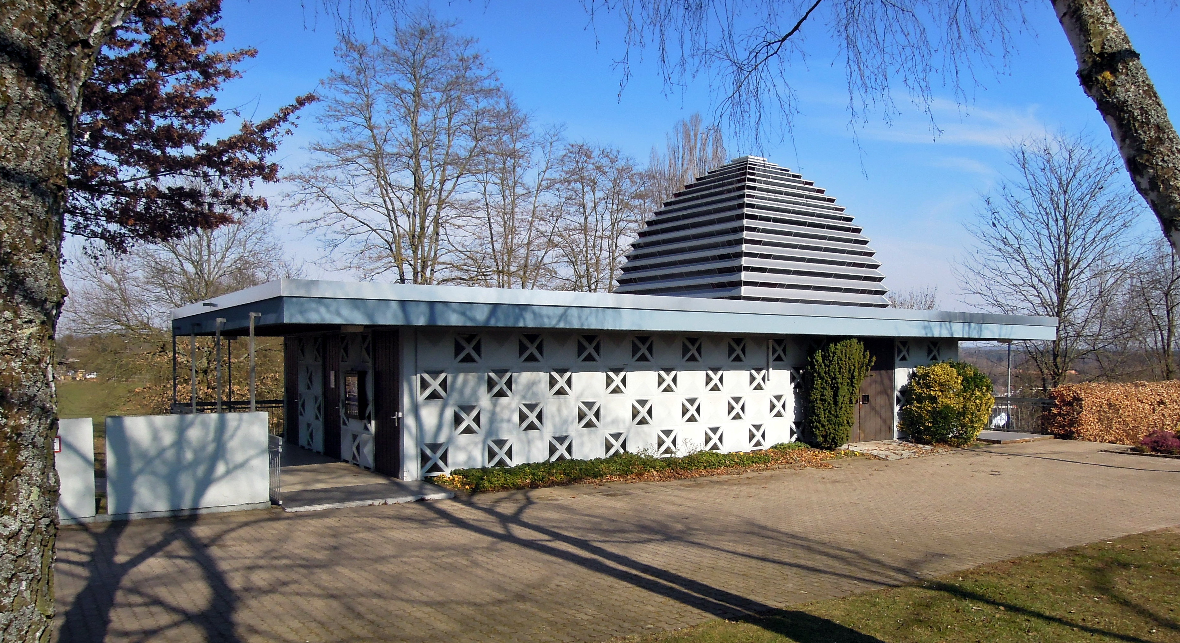 Friedhofskapelle in Diefflen. Friedhof o. Nr. , Flur 7, Flurstück 383/3, Einsegnungshalle, 1965 von Konrad Schmitz (Einzeldenkmal)